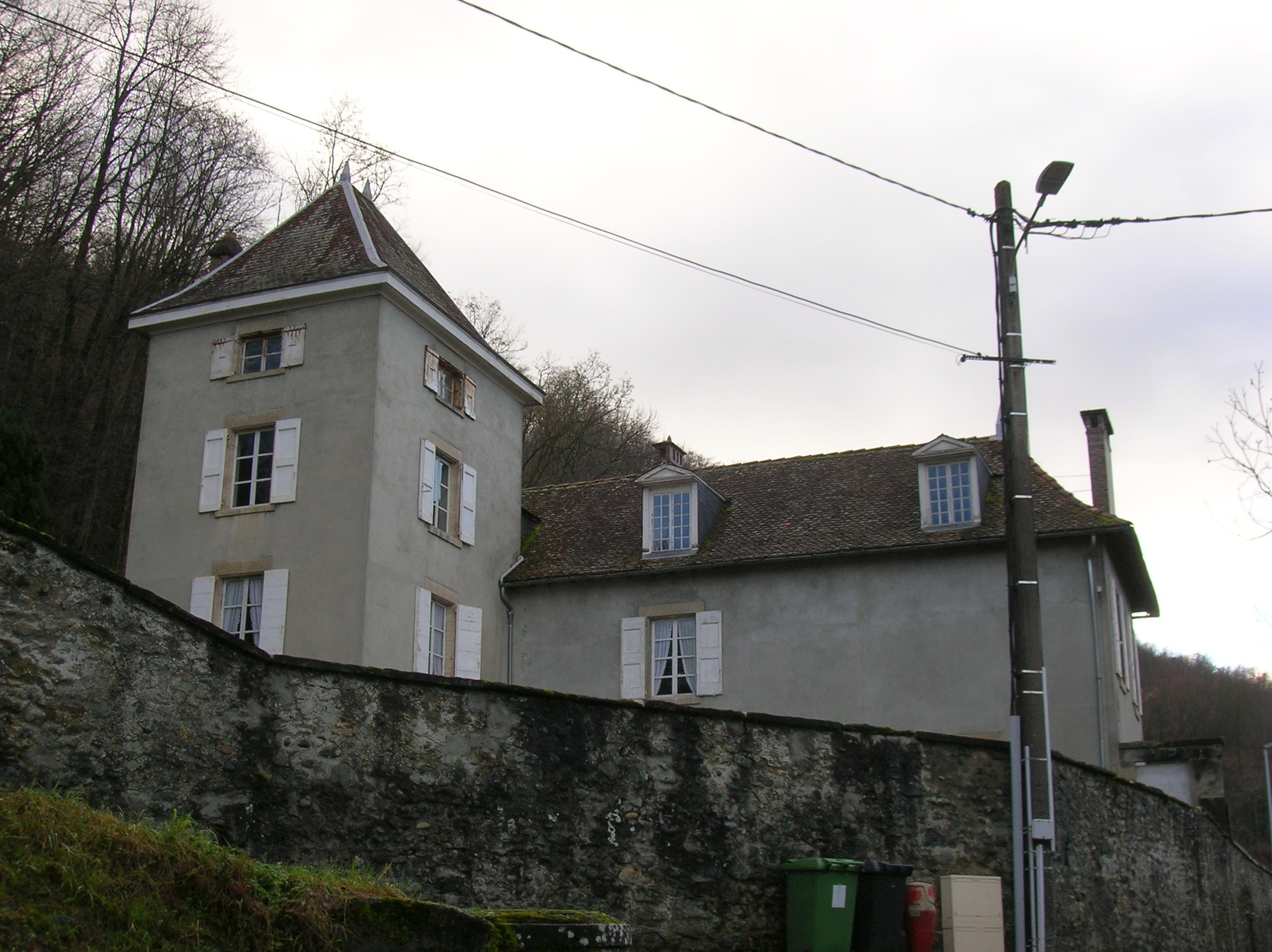 Chateau Loire. Murianette, Isère, France.